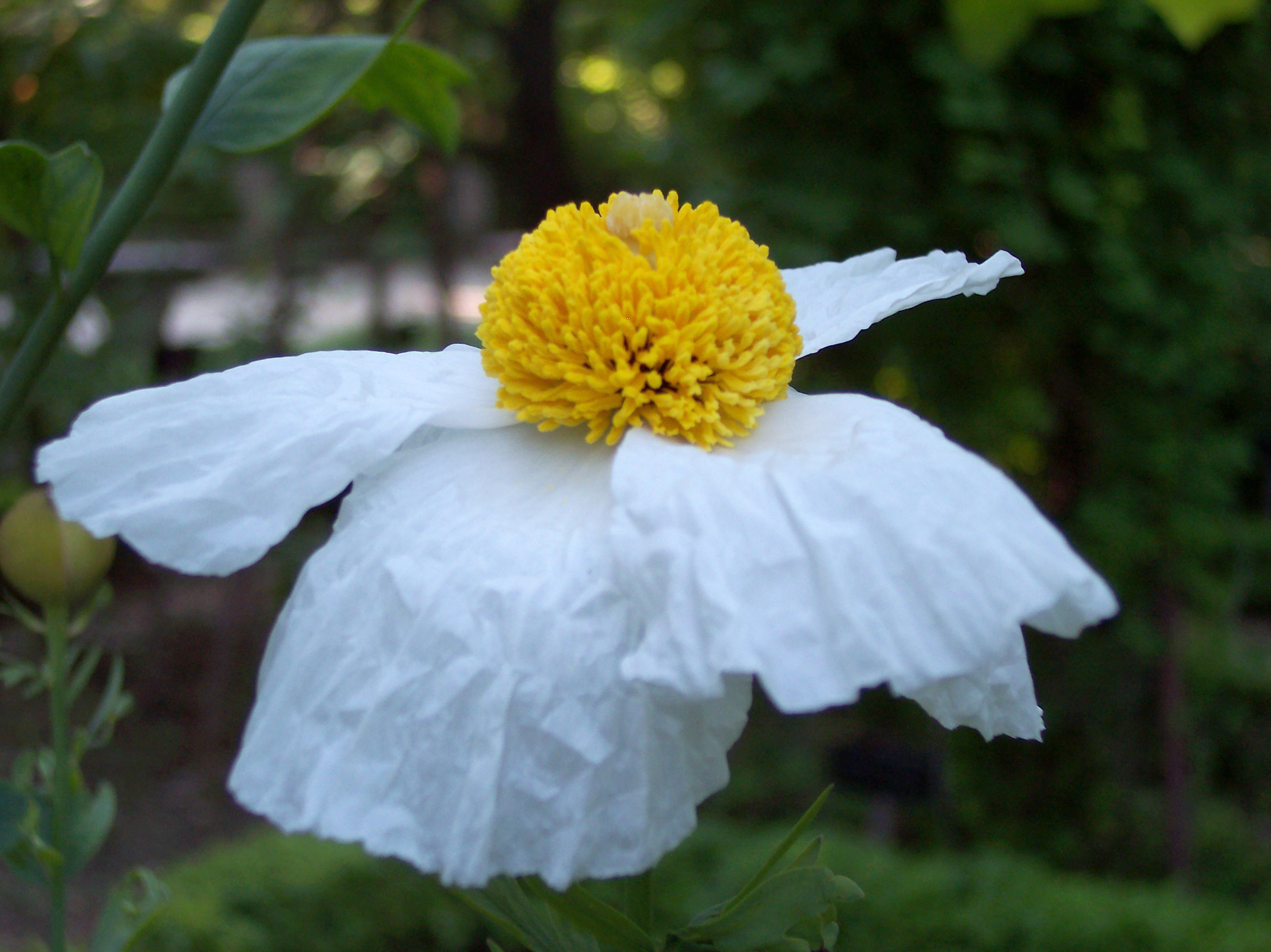 Romneya coulteri. Real Jardín Botánico, Madrid